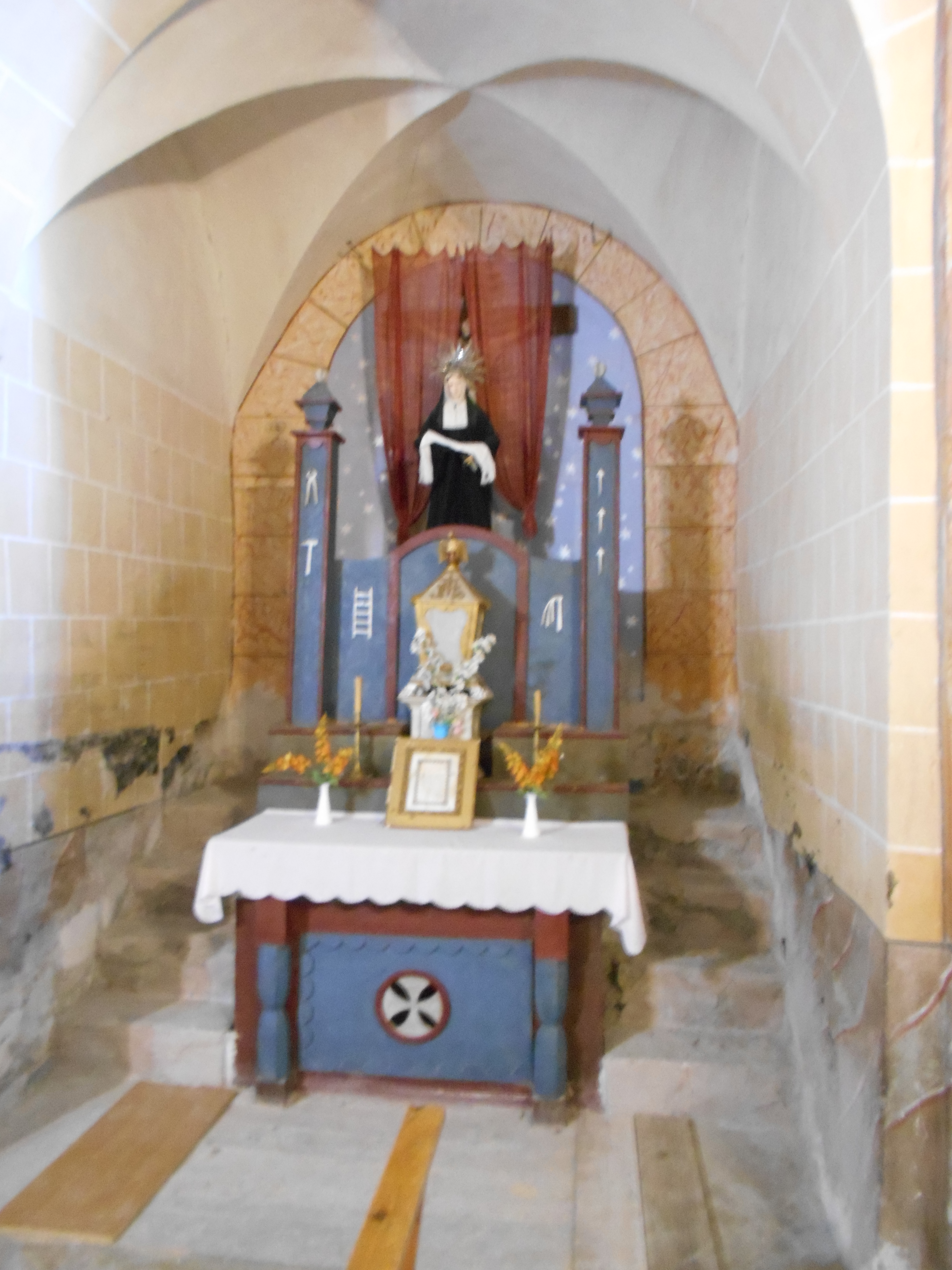 Absis lateral de Sant Lliser